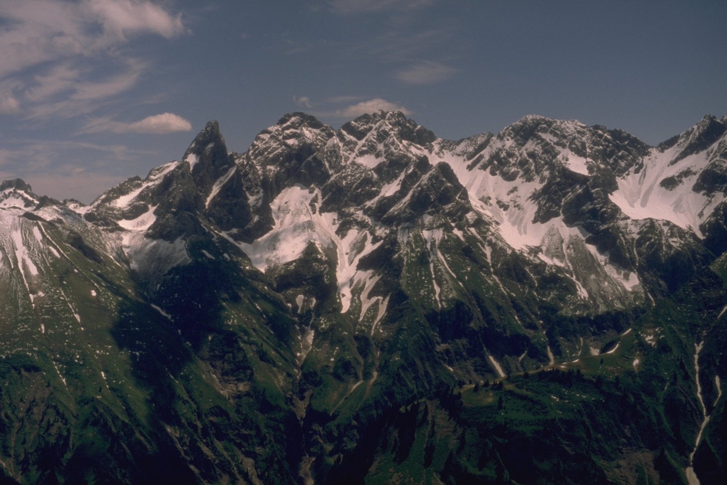 Mädelegabelgruppe von Nordwesten